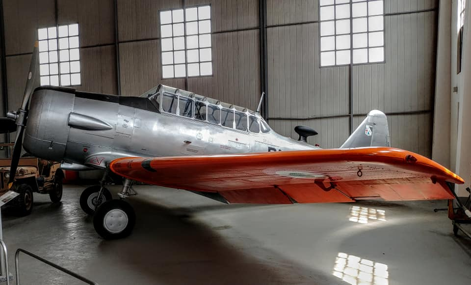 North america T 6 Texas Volandia